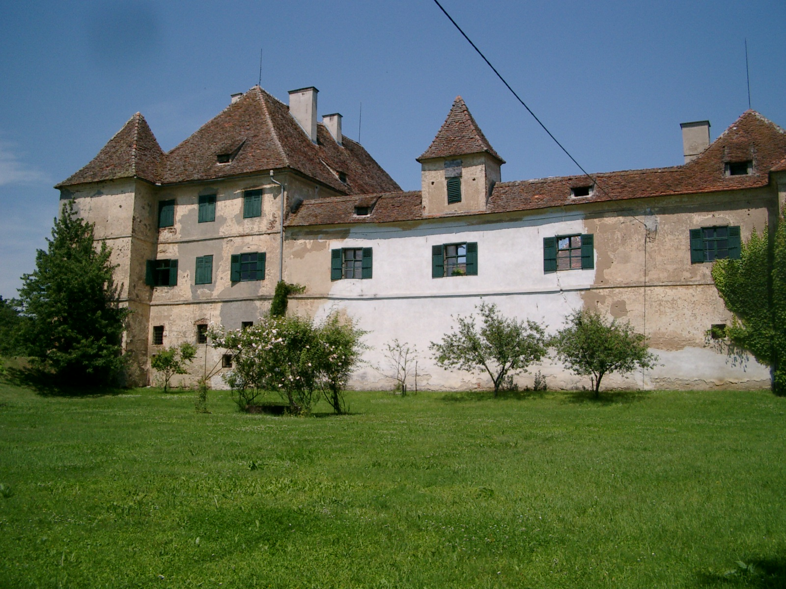 Schloss Hohenbrugg-Weinberg